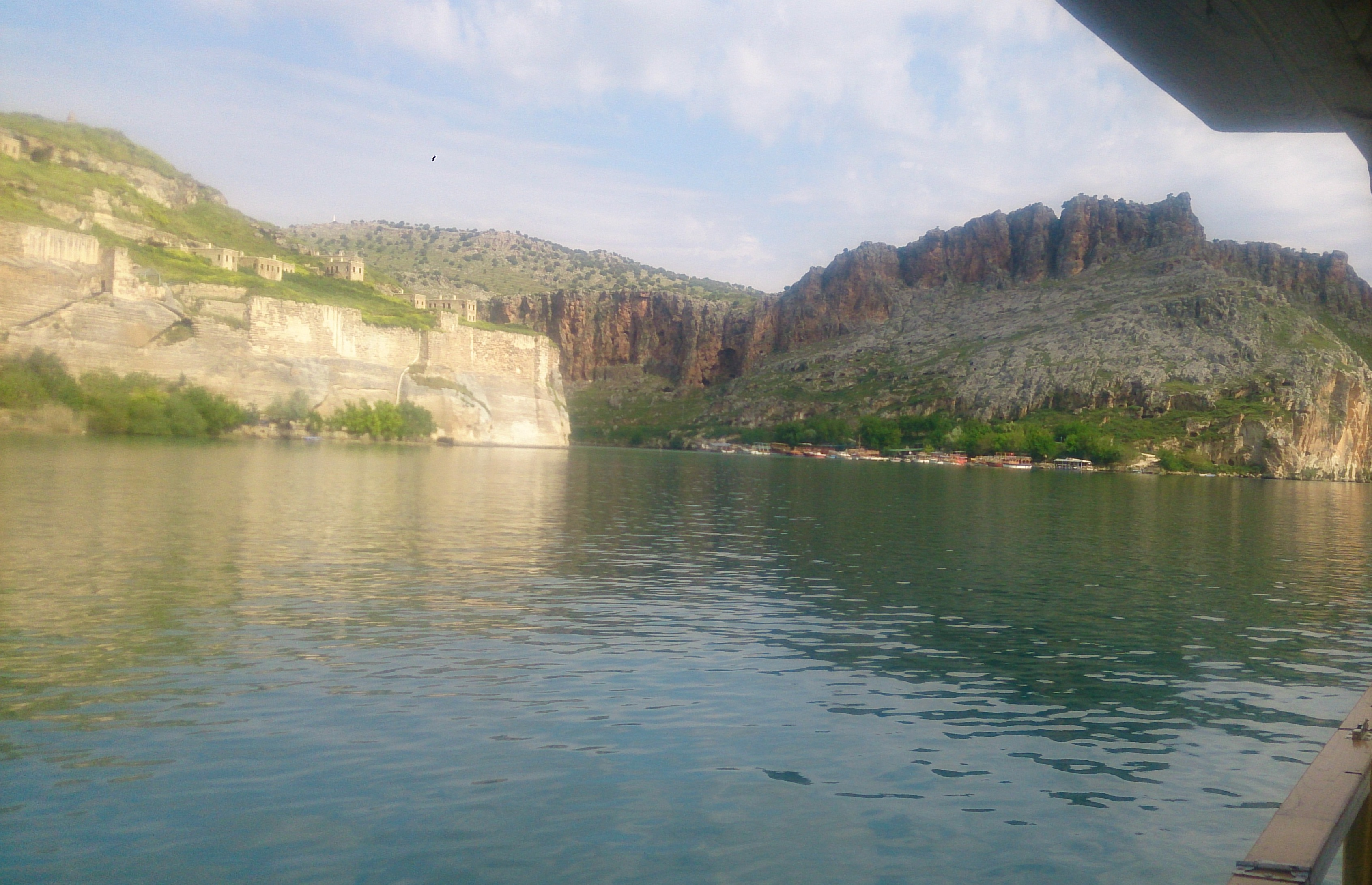 Rumkale, Sanliurfa 20190429